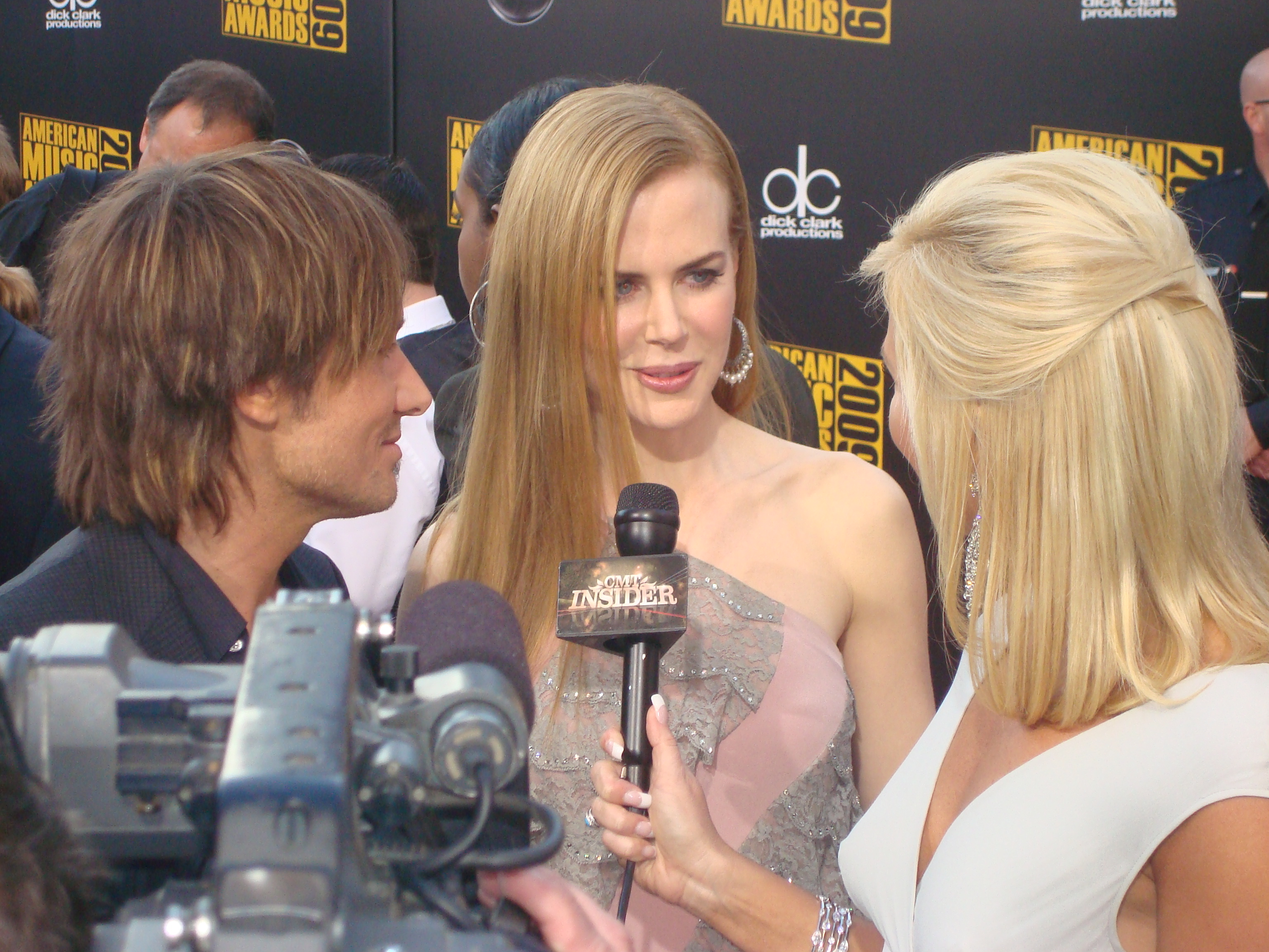 Nicole Kidman no American Music Award (2009)